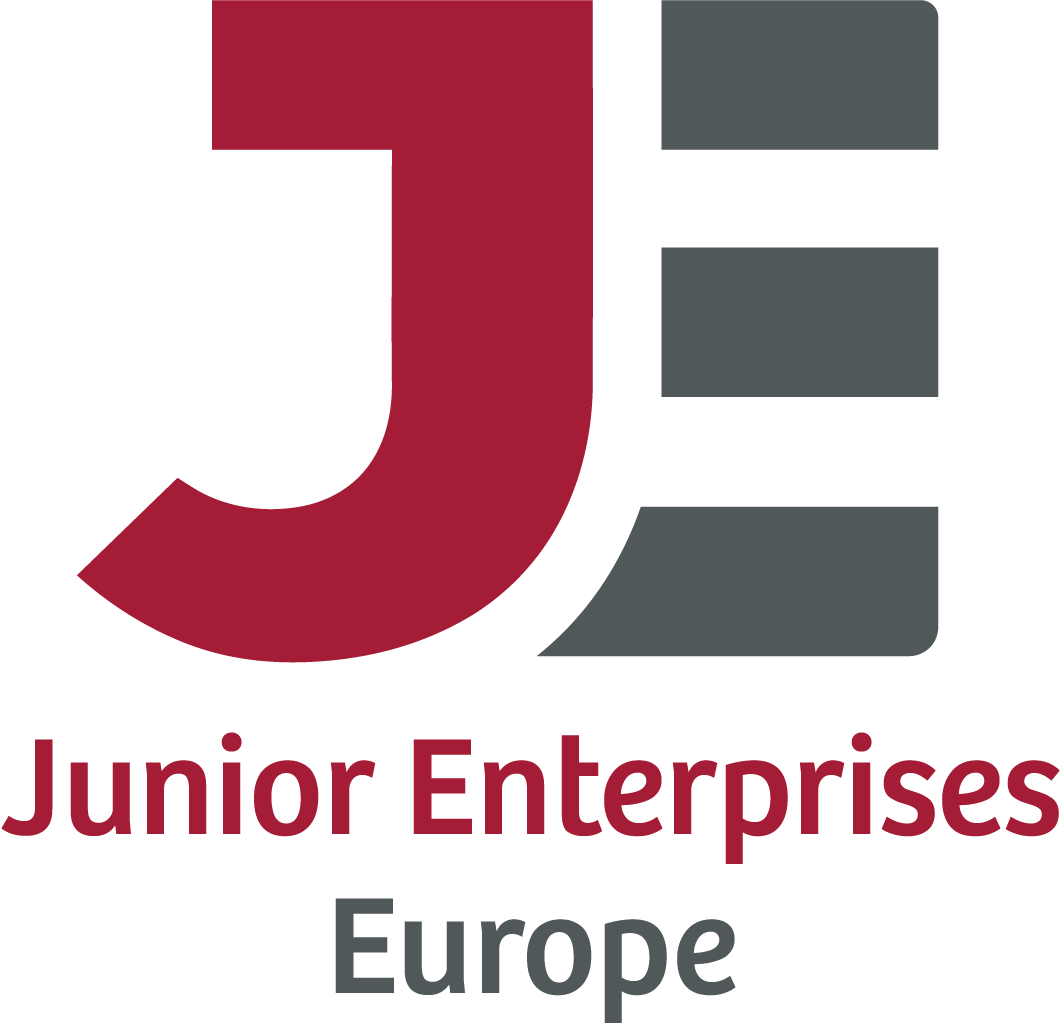 Logo de la Confédération Européenne des Junior-Entreprises